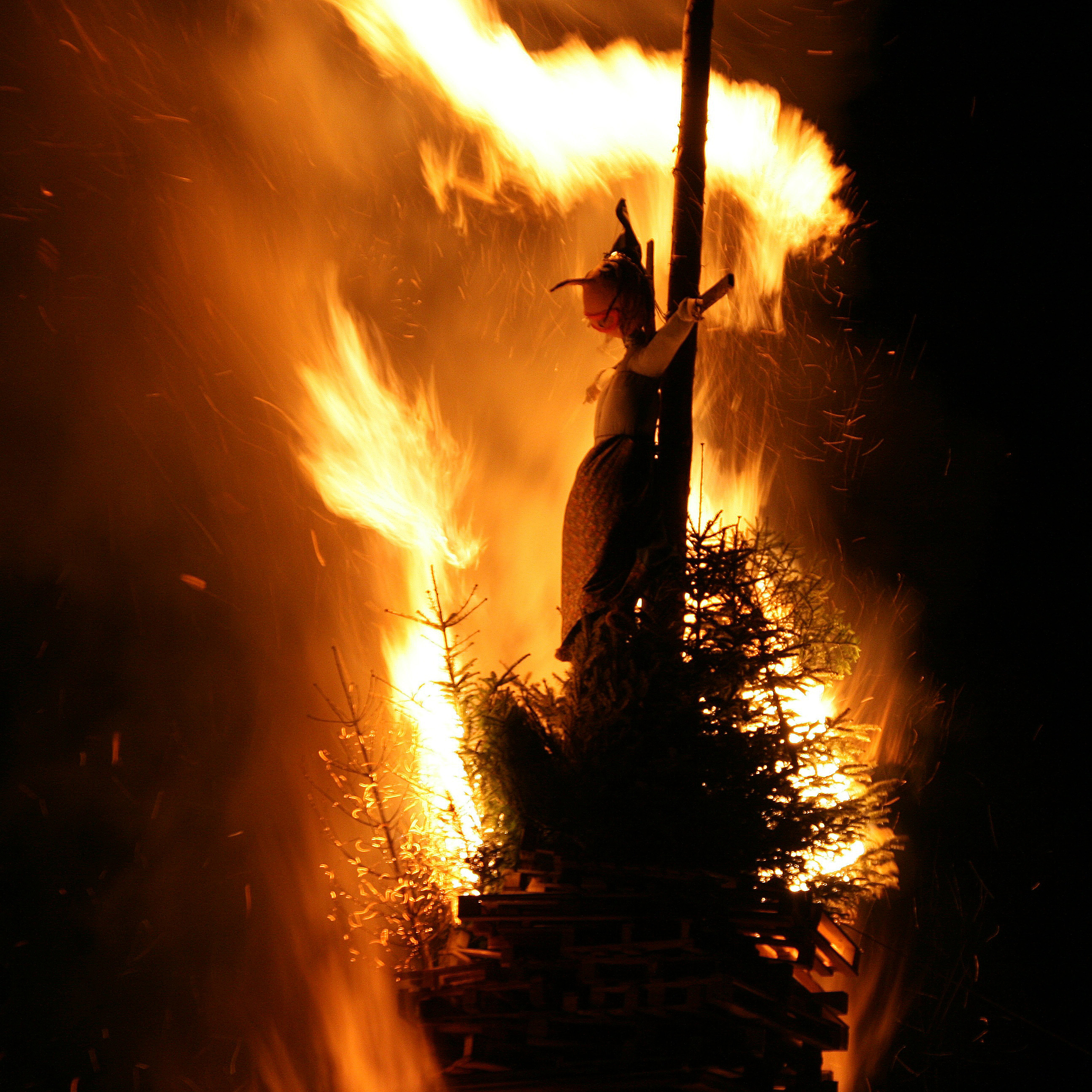 das traditionelle Funkenfeuer am Oberfallenberg in Dornbirn, Vorarlberg.